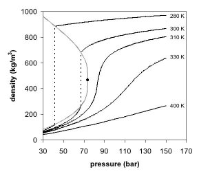 Carbon dioxide density-pressure phase diagram